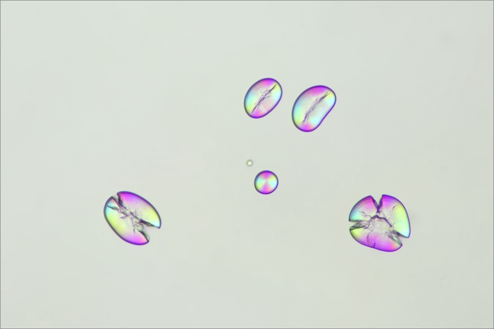 Stärke des Bohnensamens im polarisierten Durchlicht